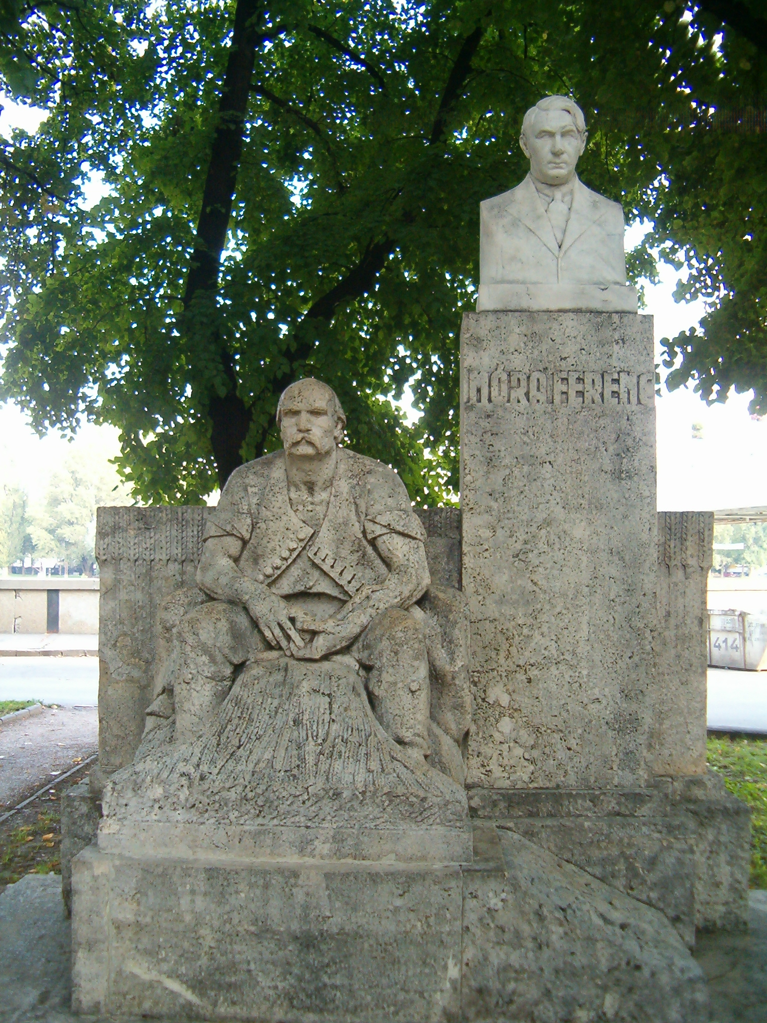 Móra Ferenc szobra Szegeden, a nevét viselő Múzeum előtti parkban // Ferenc MORA, Hungarian novelist photo taken by the uploader in 2005